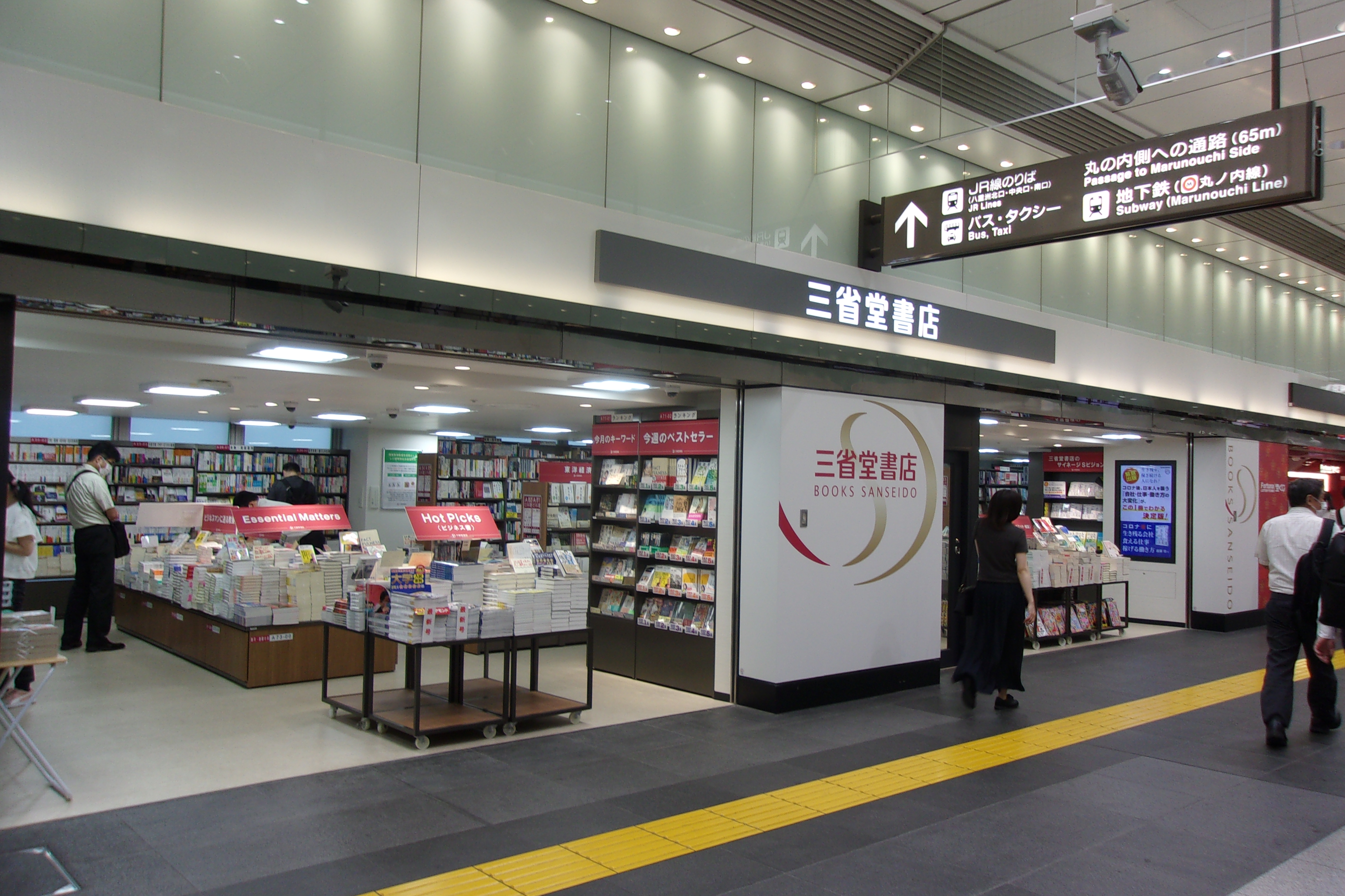 東京駅一番街内で移転リニューアルした三省堂書店